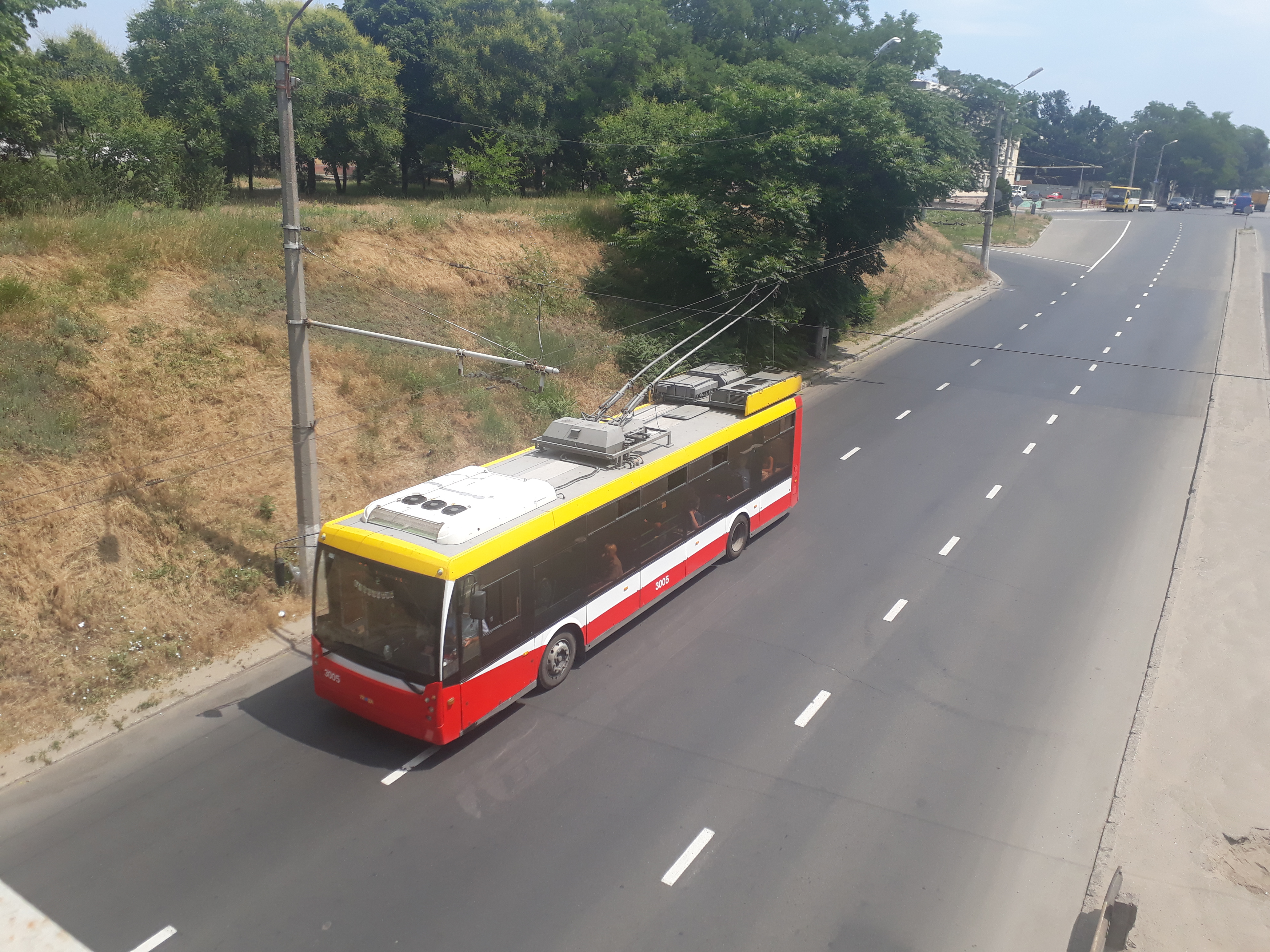 Тролейбус Тролза Мегаполіс 12-го маршруту біля залізничної станції Застава-2.